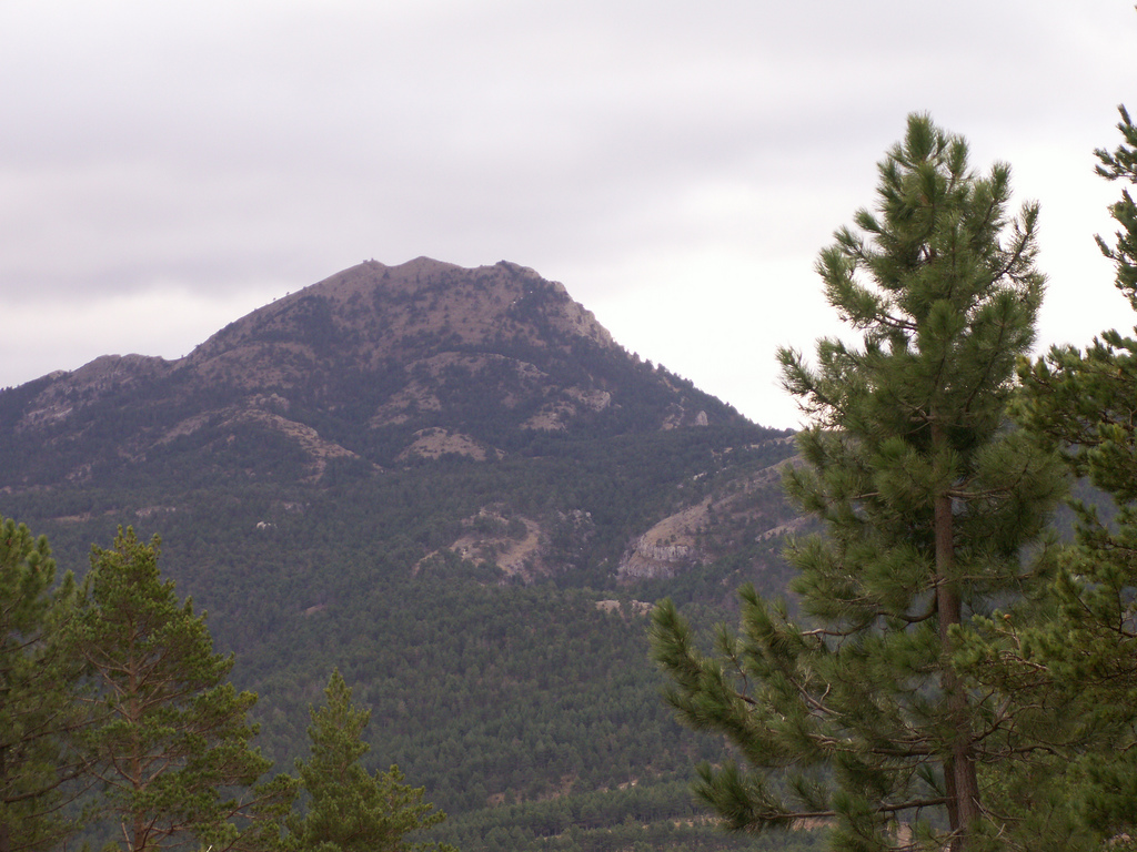 Penyagolosa, 29 de gener de 2009